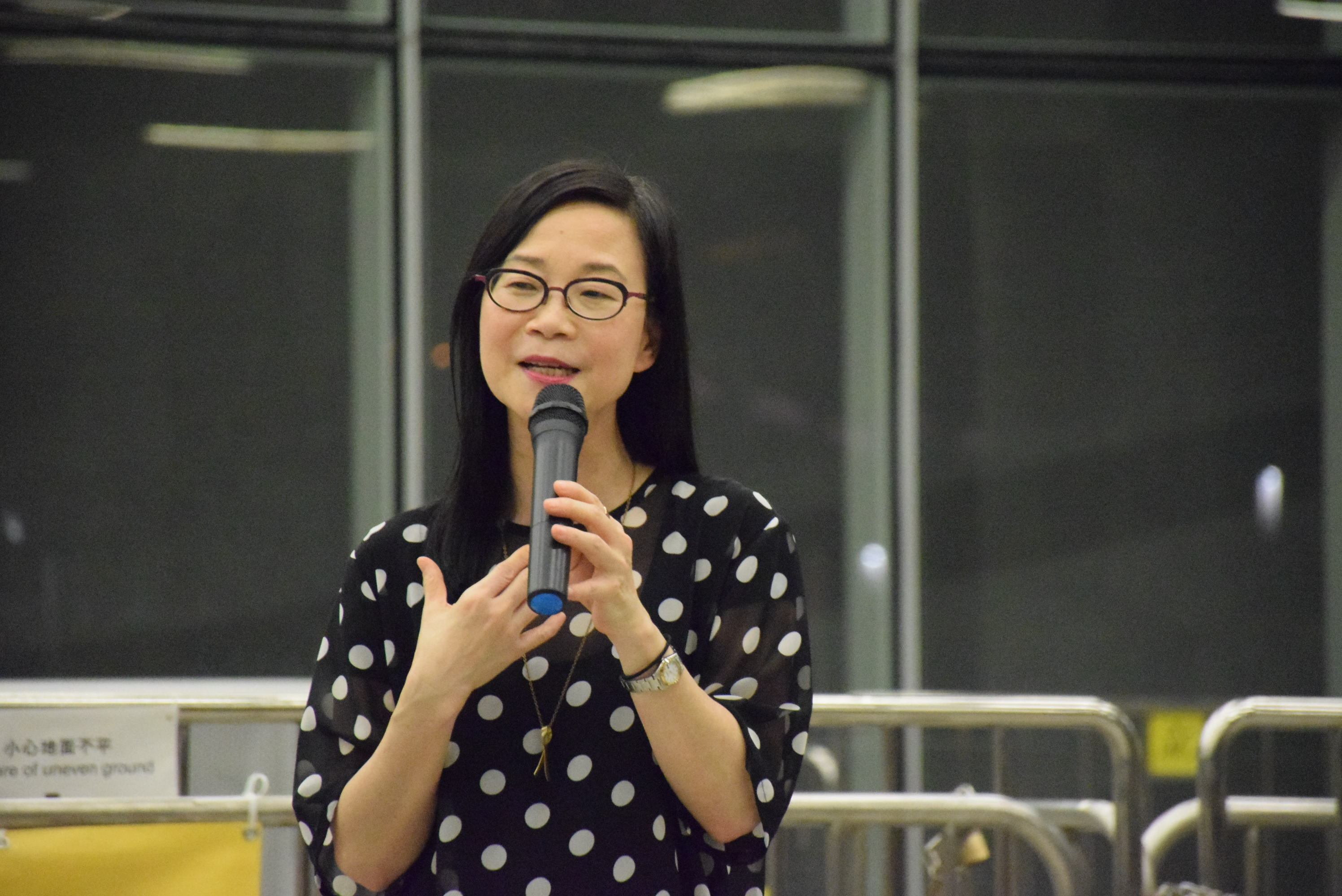 Dr. HO Sik-ying, Petula